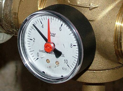 Manometer